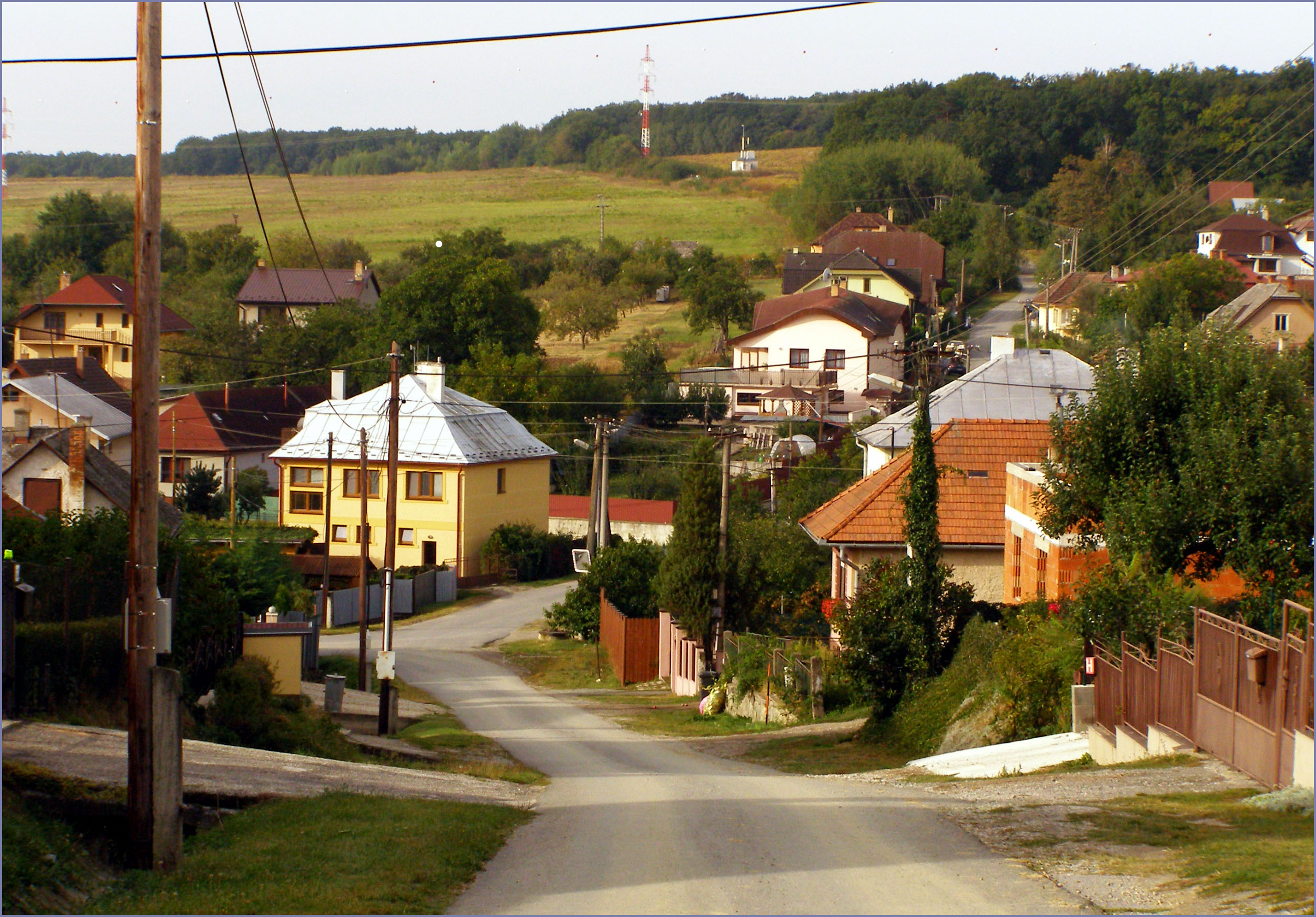 Cesta od kostola